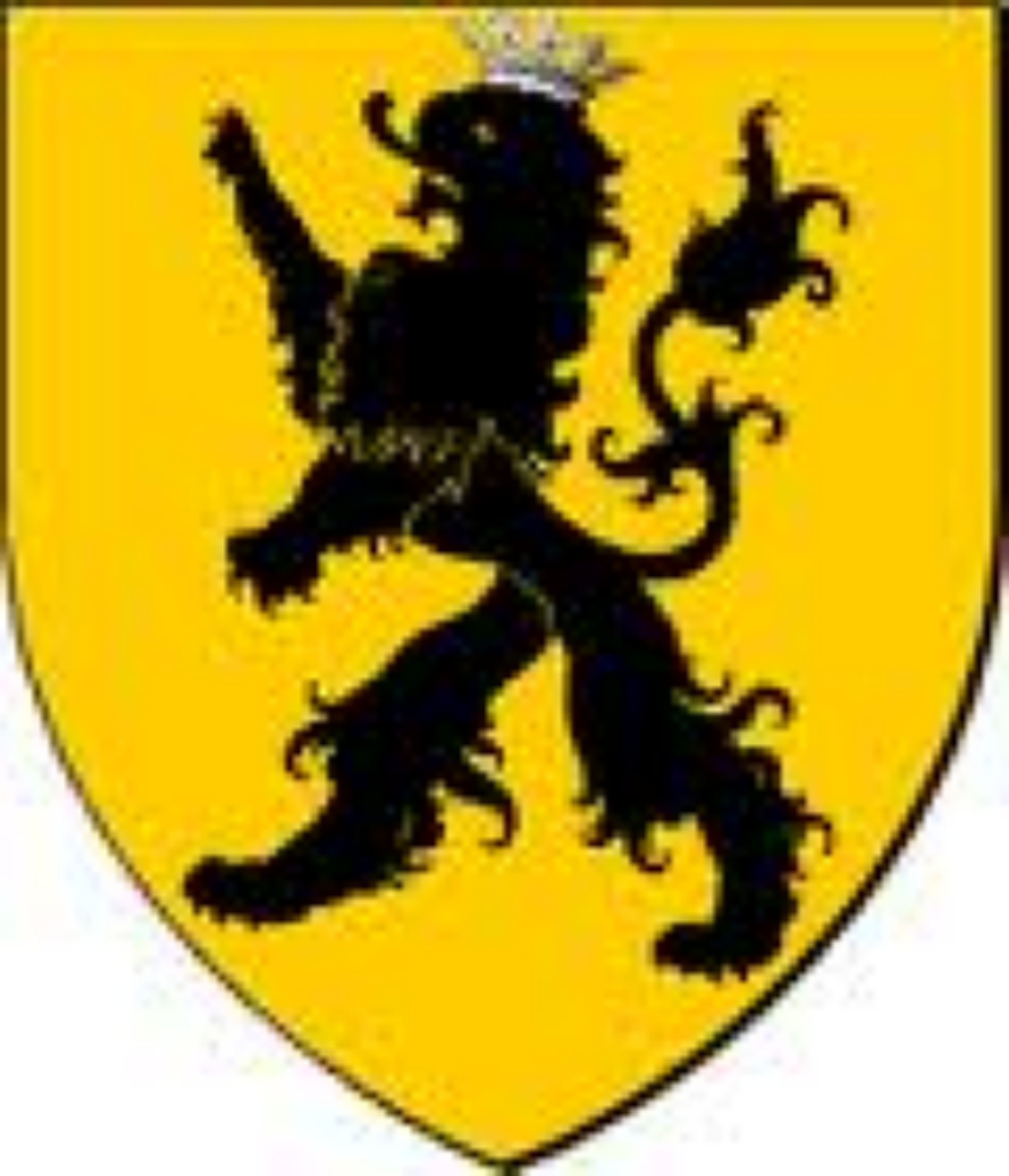 D’or à un lion de sable couronné d’argent.